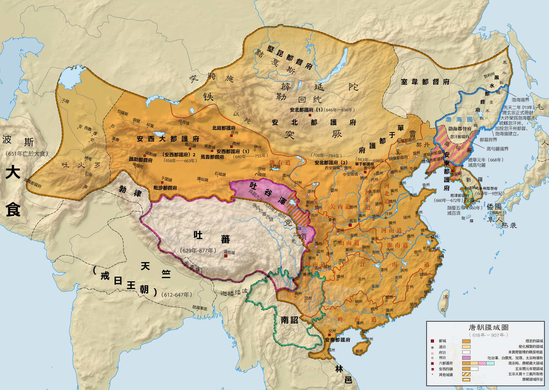 唐疆